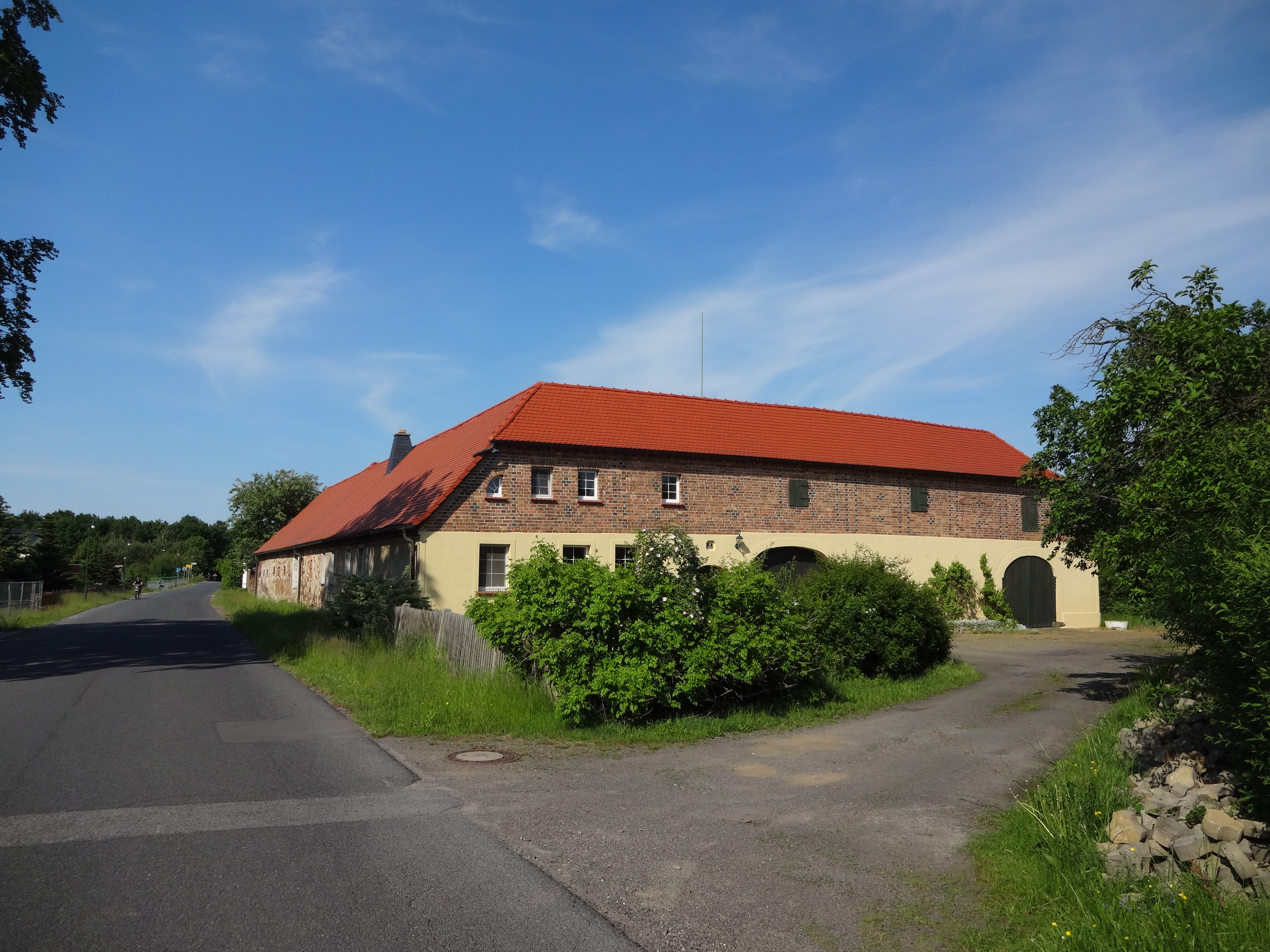 Bauerngehöft in der Dorfstraße 18 in Kleinkoschen